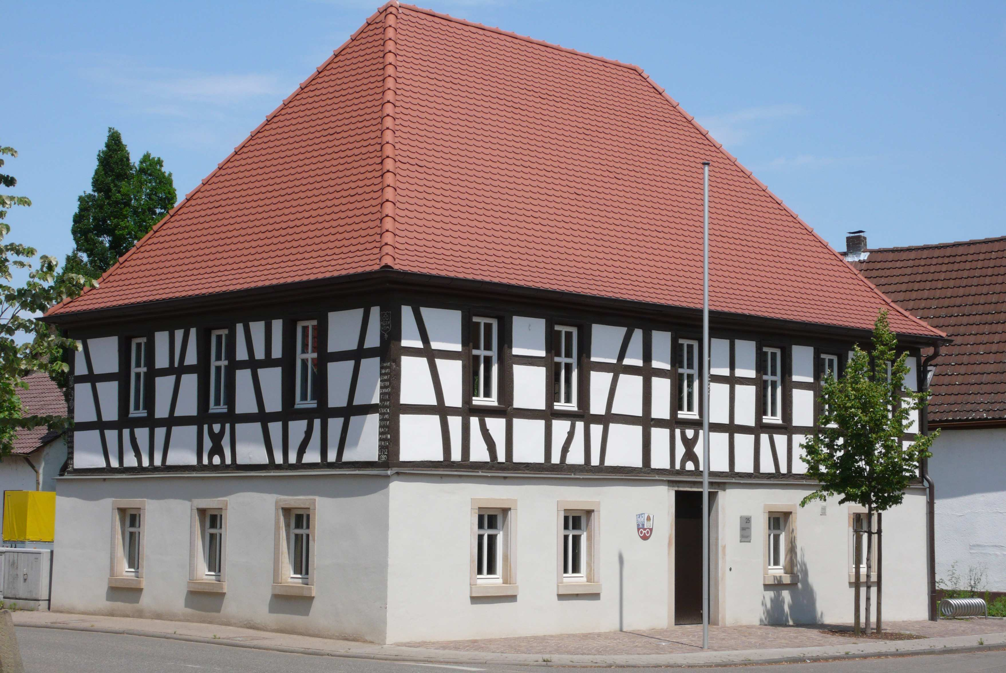 Historisches Rathaus, Assenheim, Germany